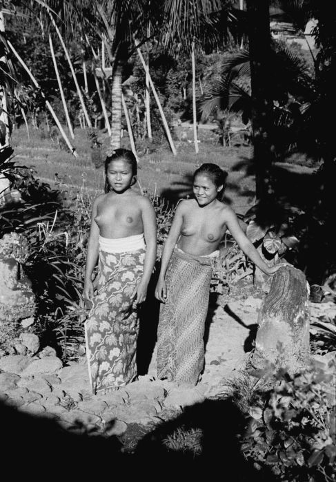 negatief. Modellen van de Zwitserse schilder Theo Meier, Iseh